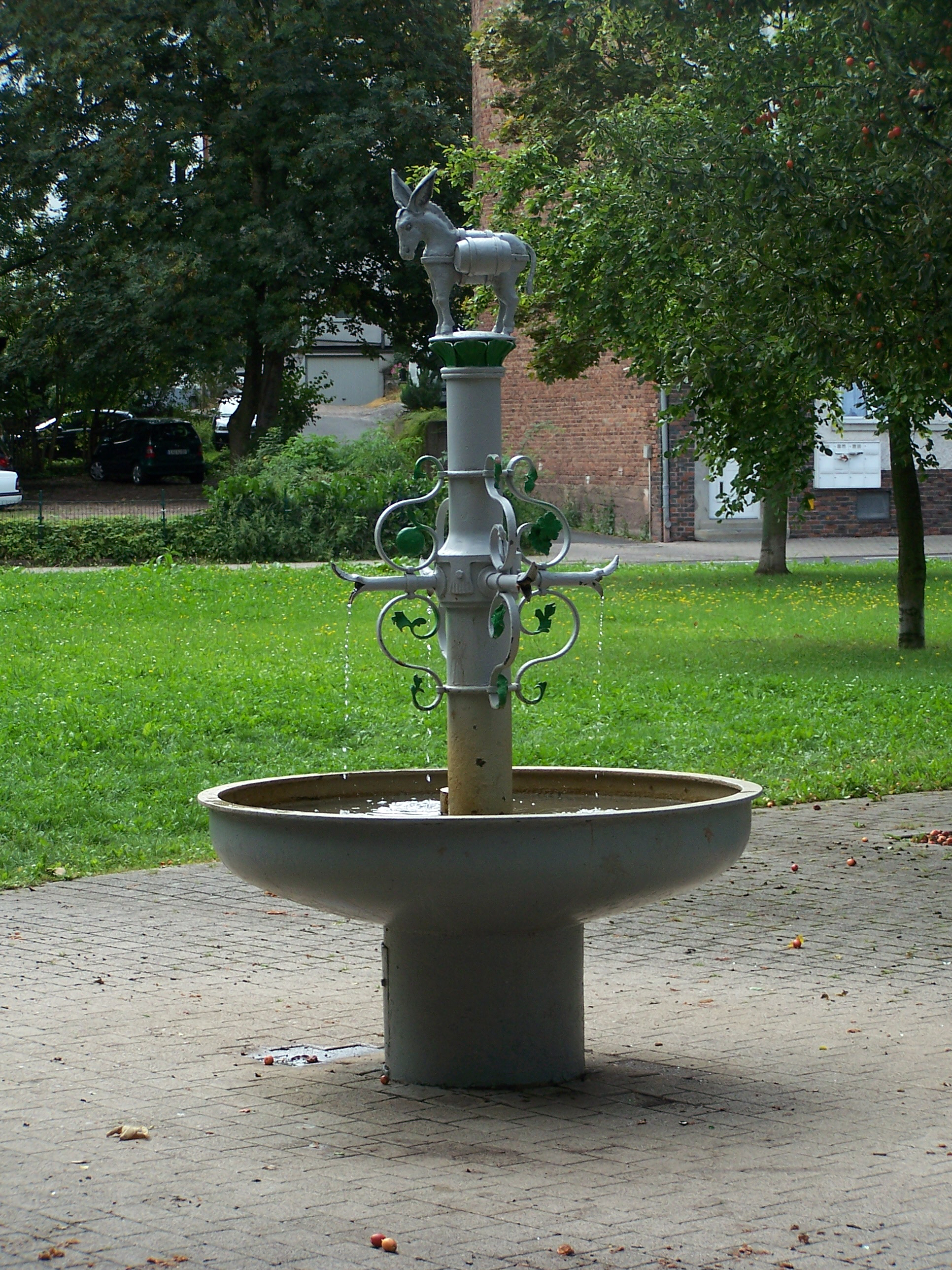 Der Eselsbrunnen ist ein Laufbrunnen in Eisenach. Der vom Eisenachger Kunstschmied Professor G. Laufer geschaffene Brunnen wurde 1986 mit dem Eisenacher Brunnenfest eingeweiht. Der Brunnen schmückte die innerstädtische Grünanlage Rathausgarten an der Karlstraße. Die Verlagerung des Brunnens wurde Mitte der 1990er Jahre vorgenommen, er gelangte nach einer technischen Überholung in den Park Goethegarten in Eisenach, Hinter der Mauer.